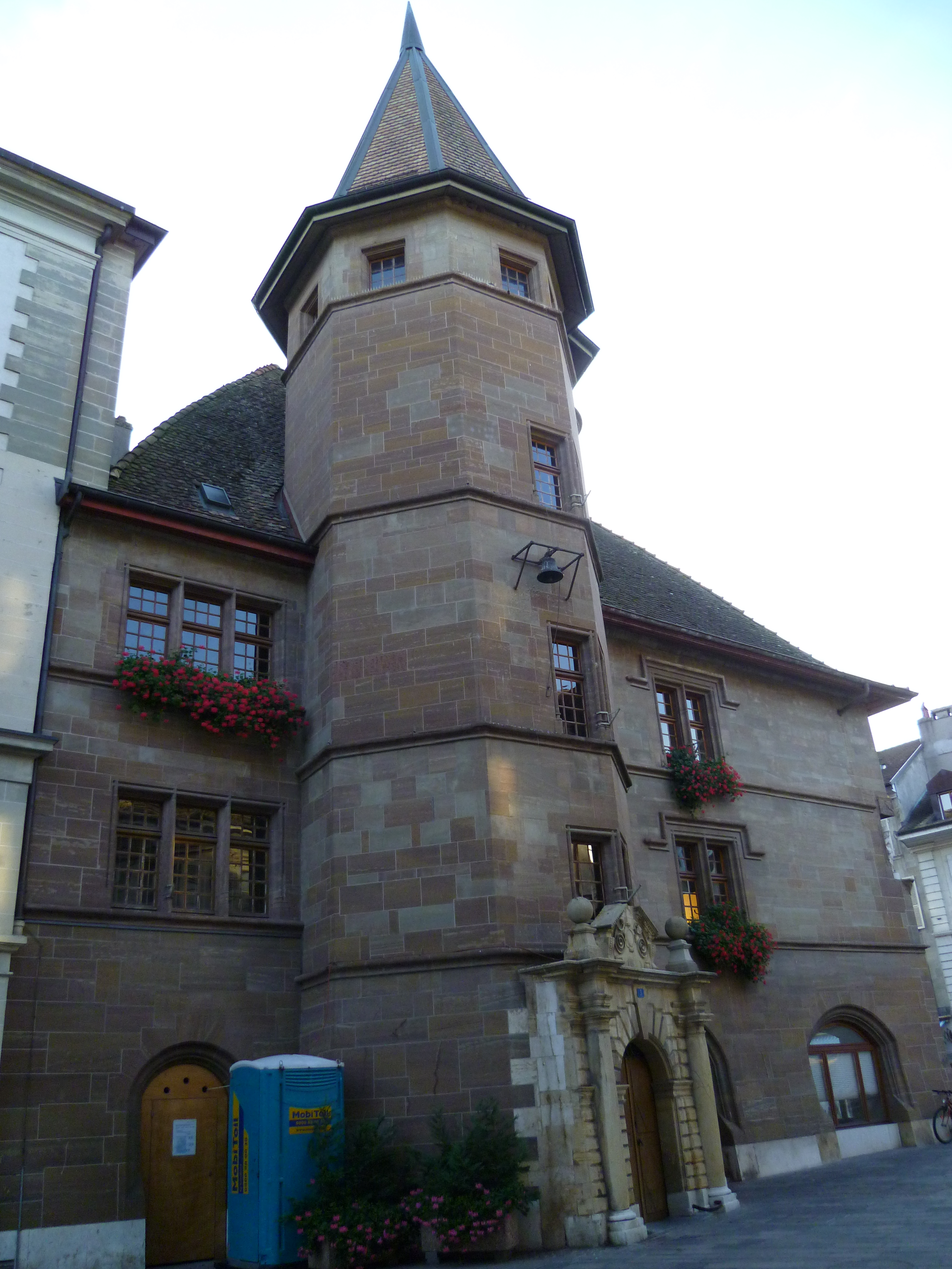 L'Hôtel de ville de Morges, Vaud.